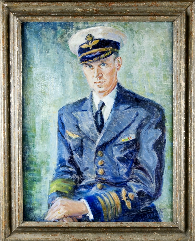 Porträttmålning på Överste Artur Falk, flottiljchef på Västmanlands flygflottilj (F 1) 1945-1950. Målningen skapad av Micheew år 1950